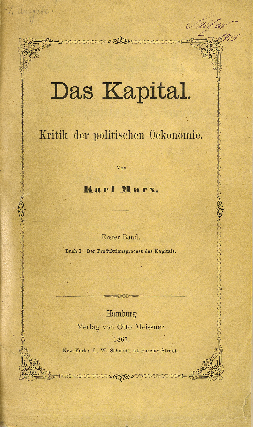 «Das Kapital» von Karl Marx in einer Ausgabe von 1867 aus der Sammlung Saitzew in der Zentralbibliothek Zürich